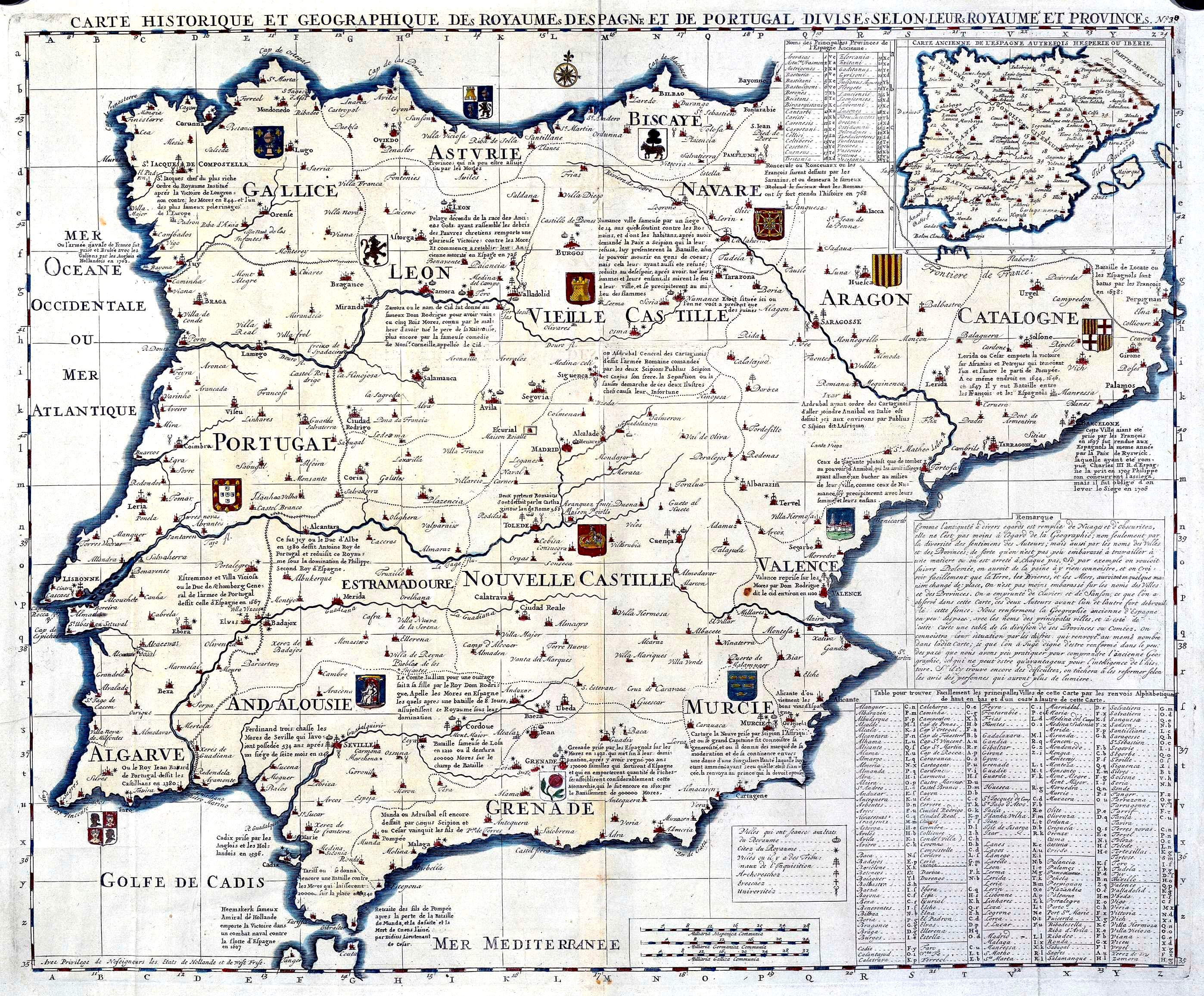 Carte historique et geographique des Royaumes D’Espagne et de Portugal Divises selon leurs Royaume et Provinces : Nº 30. Mapa procedente del "Atlas historique... de H.A. Chatelain", con ediciones desde 1705 a 1739